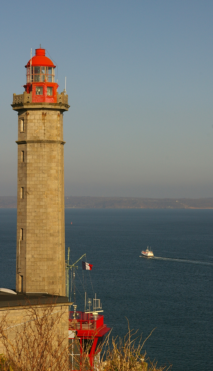 Vu de l'ouest